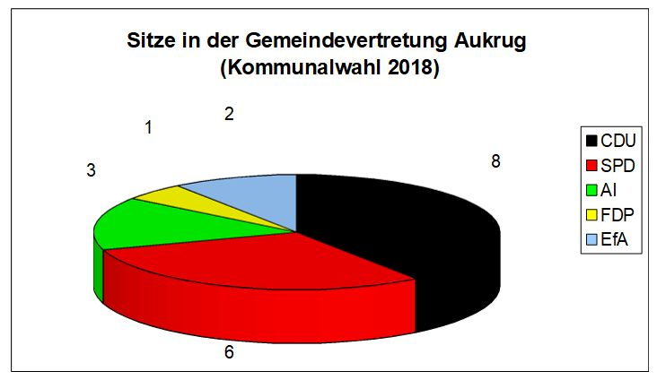 Sitzverteilung in der Aukruger Gemeindevertretung (Kommunalwahl 2018)